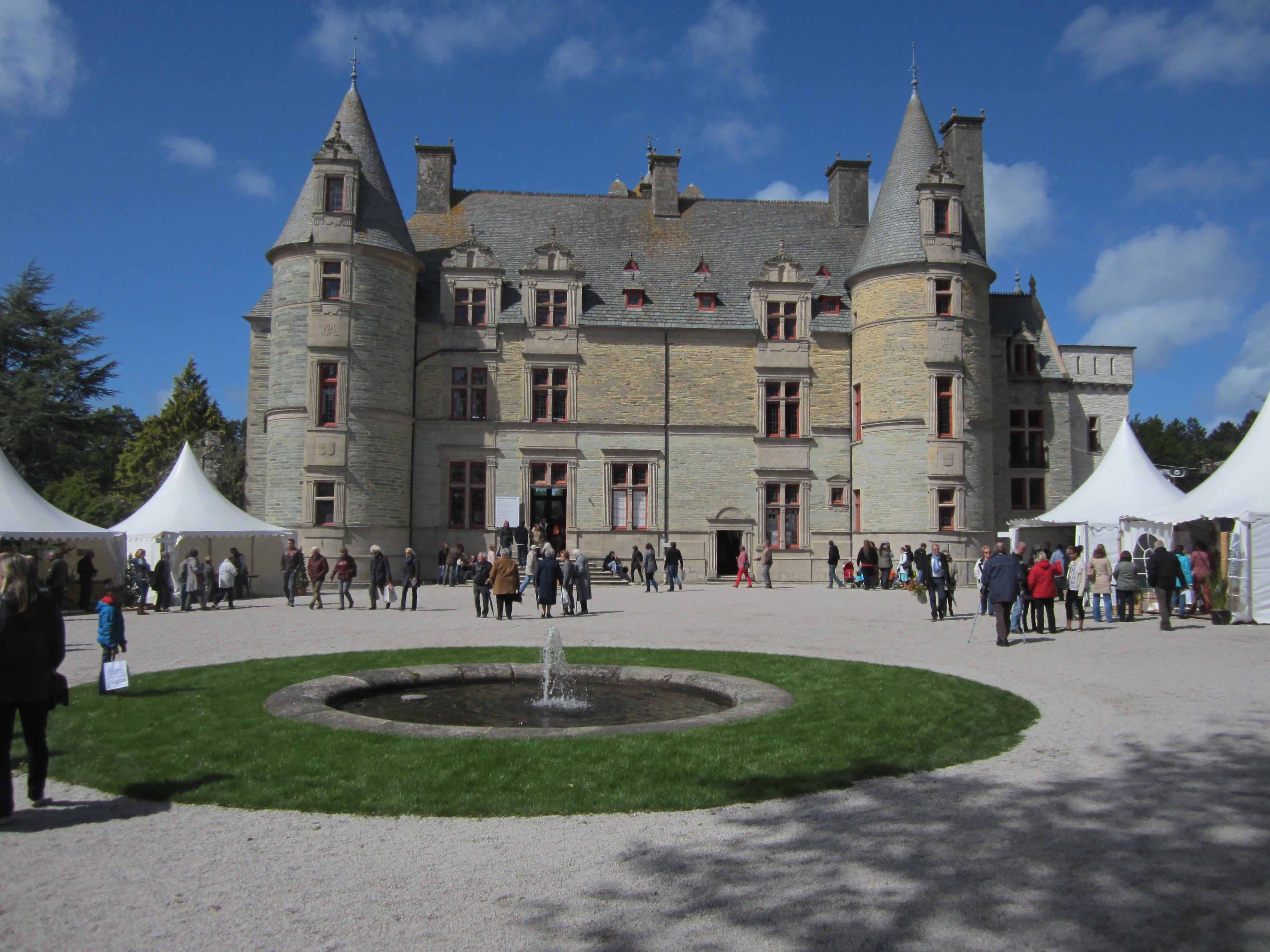 Château des Ravalet, Tourlaville, Manche Pendant l'édition Presqu'île en fleurs de 204 .